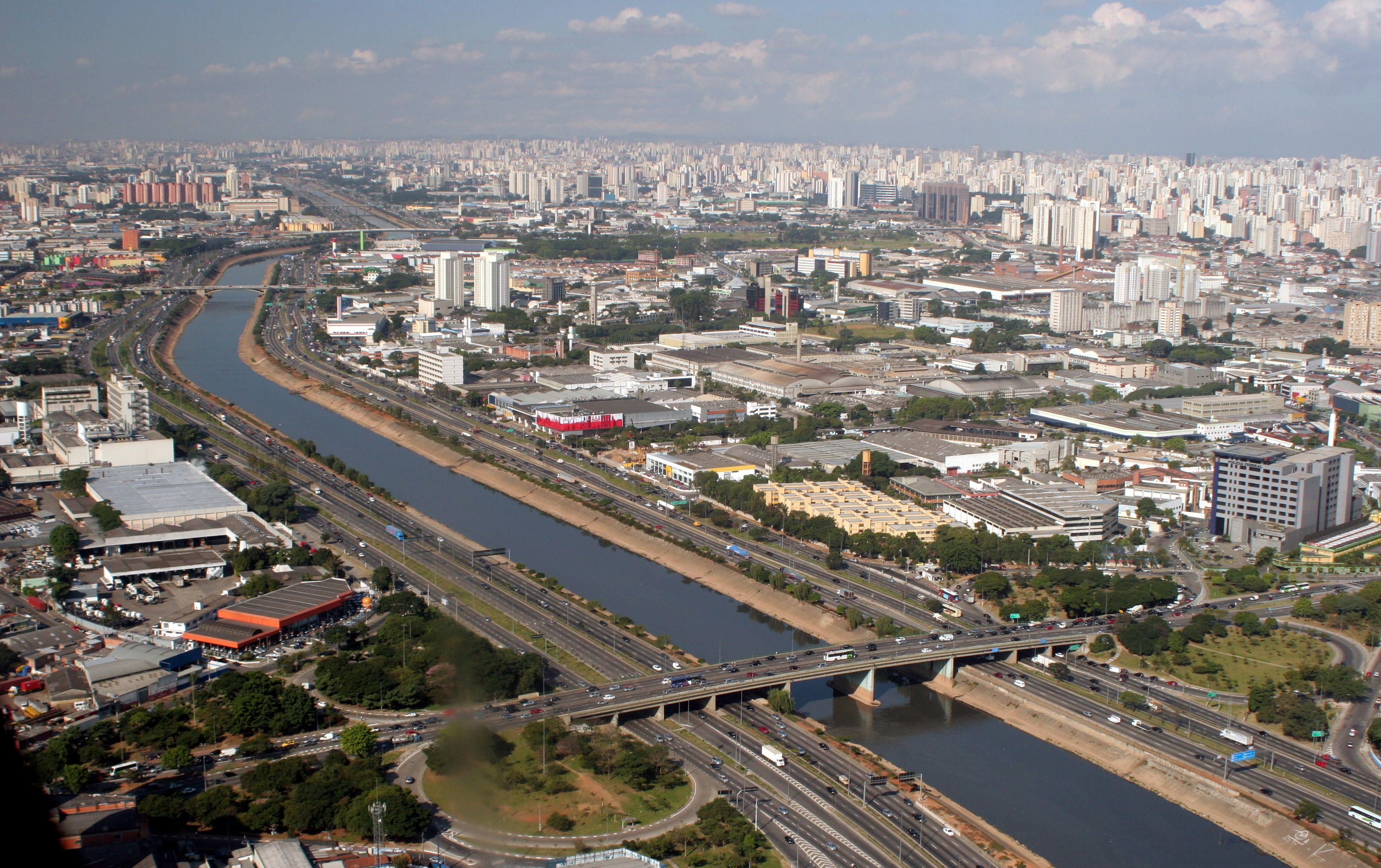 Marginal Tietê, São Paulo, Brasil